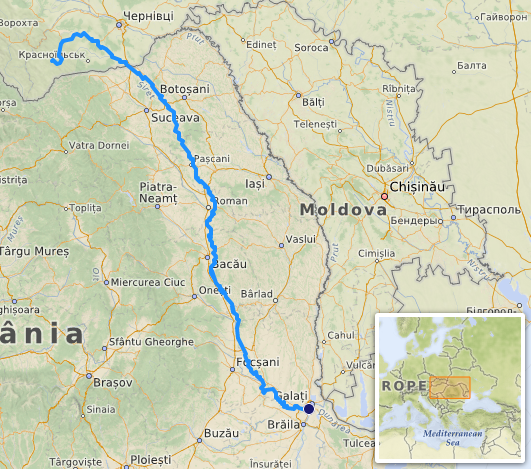 carte réalisée sur umap [1] This map may be incomplete, and may contain errors. Don't rely solely on it for navigation.